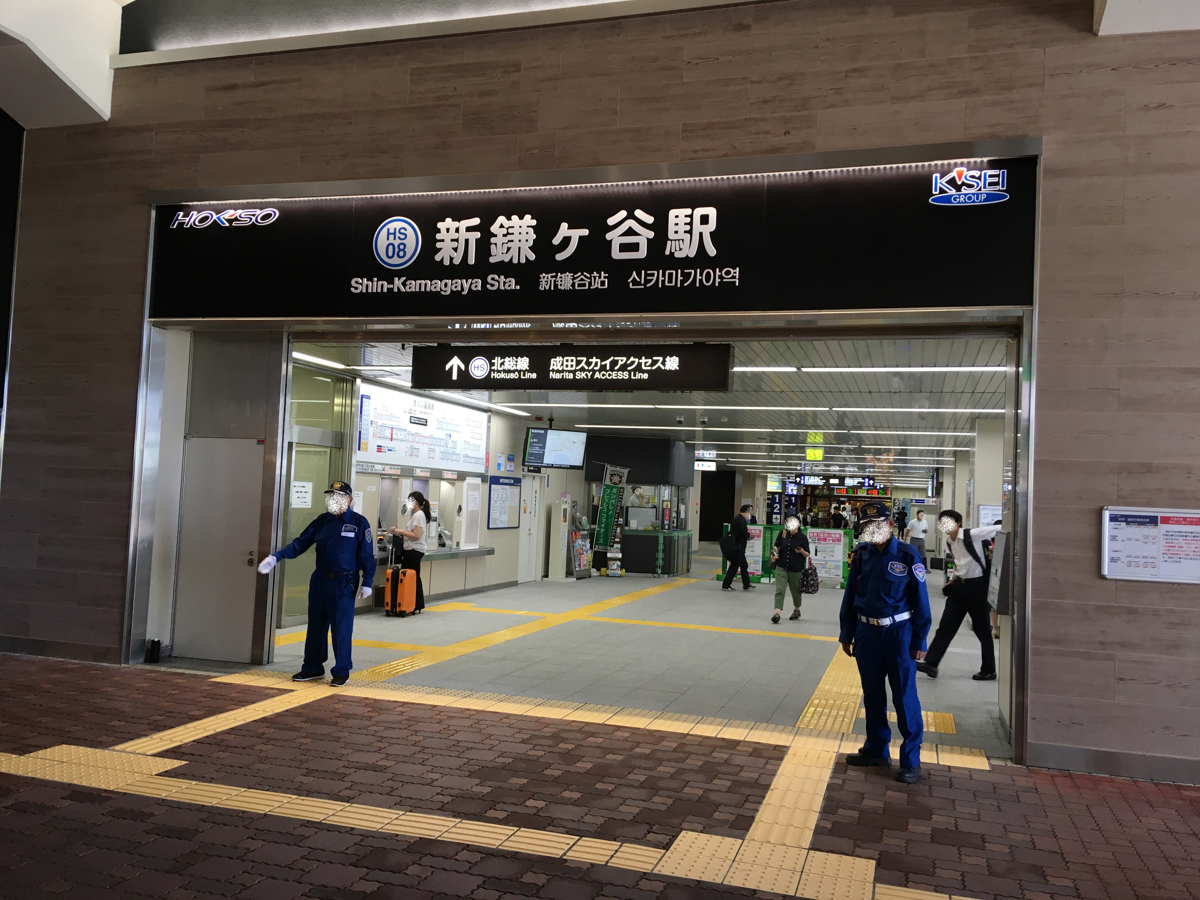 北総鉄道新鎌ヶ谷駅舎入口